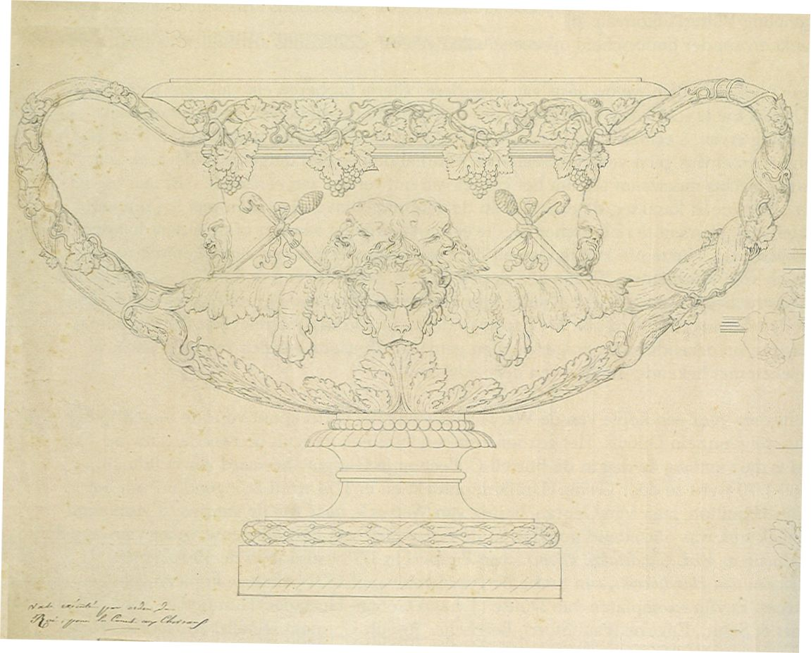 Tekening van Jospeph Germain Dutalis (1780-1852) in de universiteitsbibliotheek van Luik.Voorheen collectie baron Adrien Wittert.